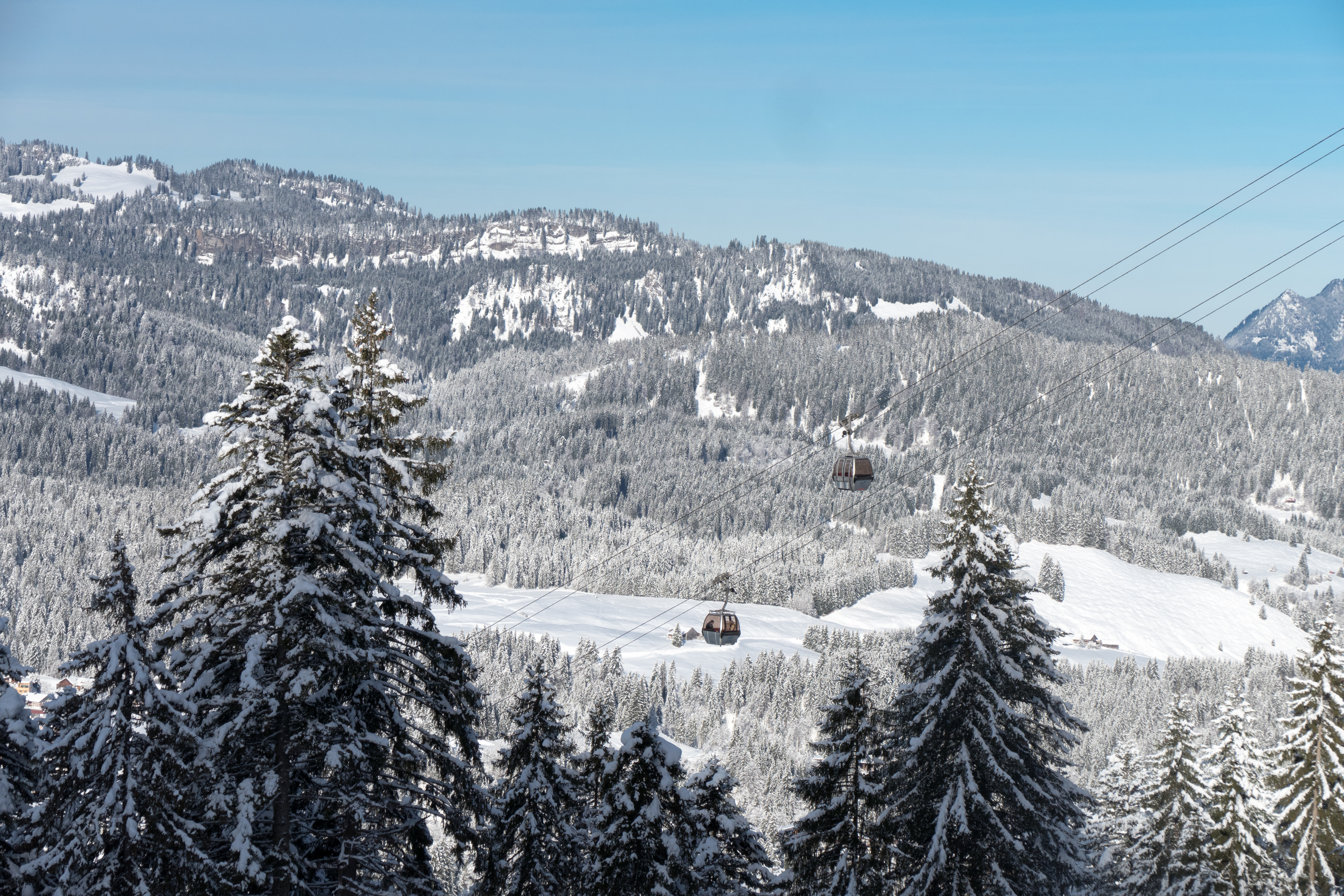 Die Kanzelwandbahn im Kleinwalsertal im Winter